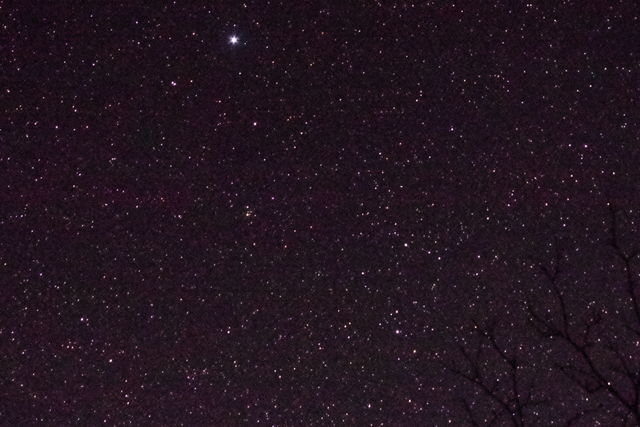 こと座の全体像。